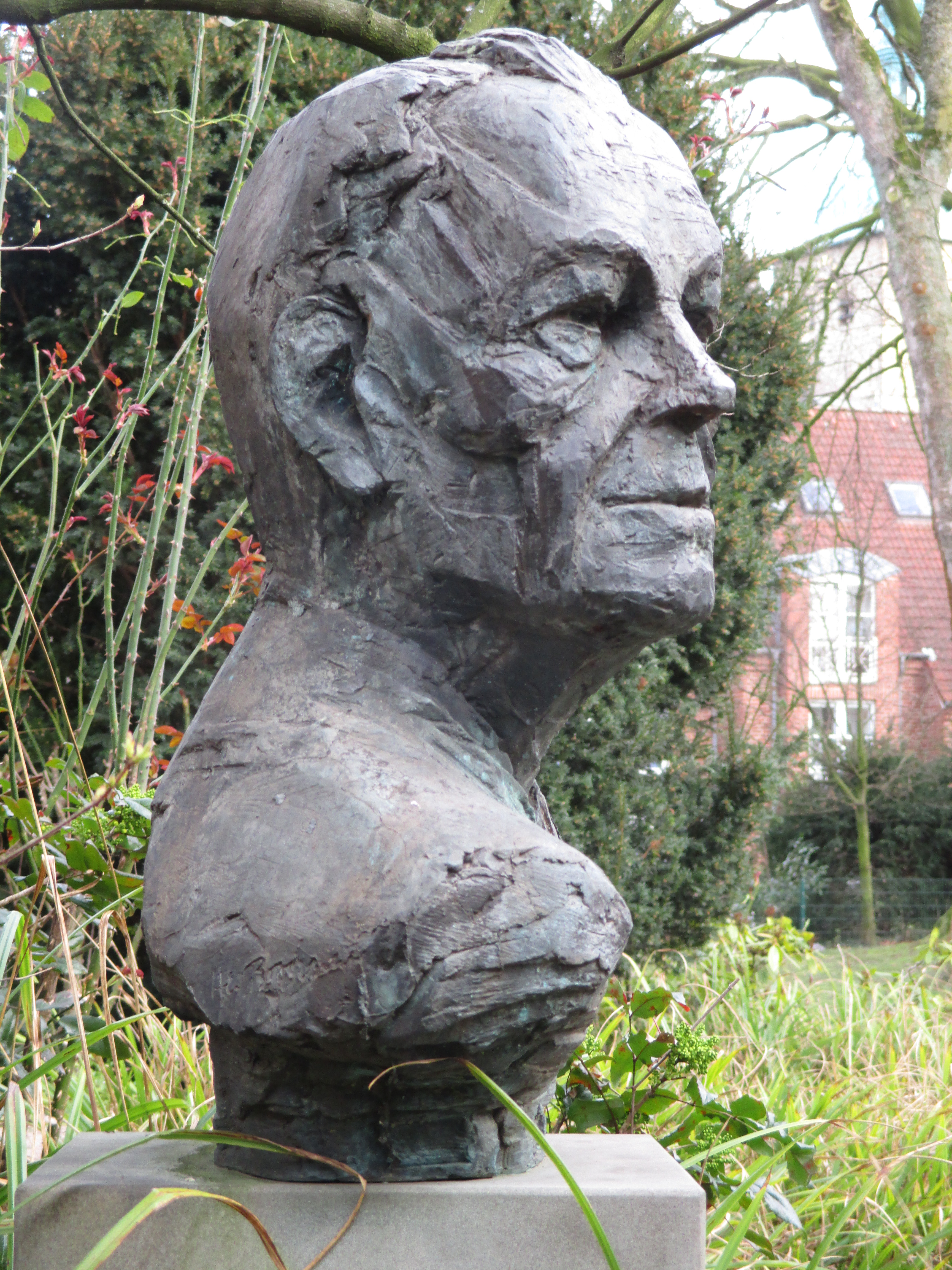 Büste von Willy Brandt vor der Volkshochschule.